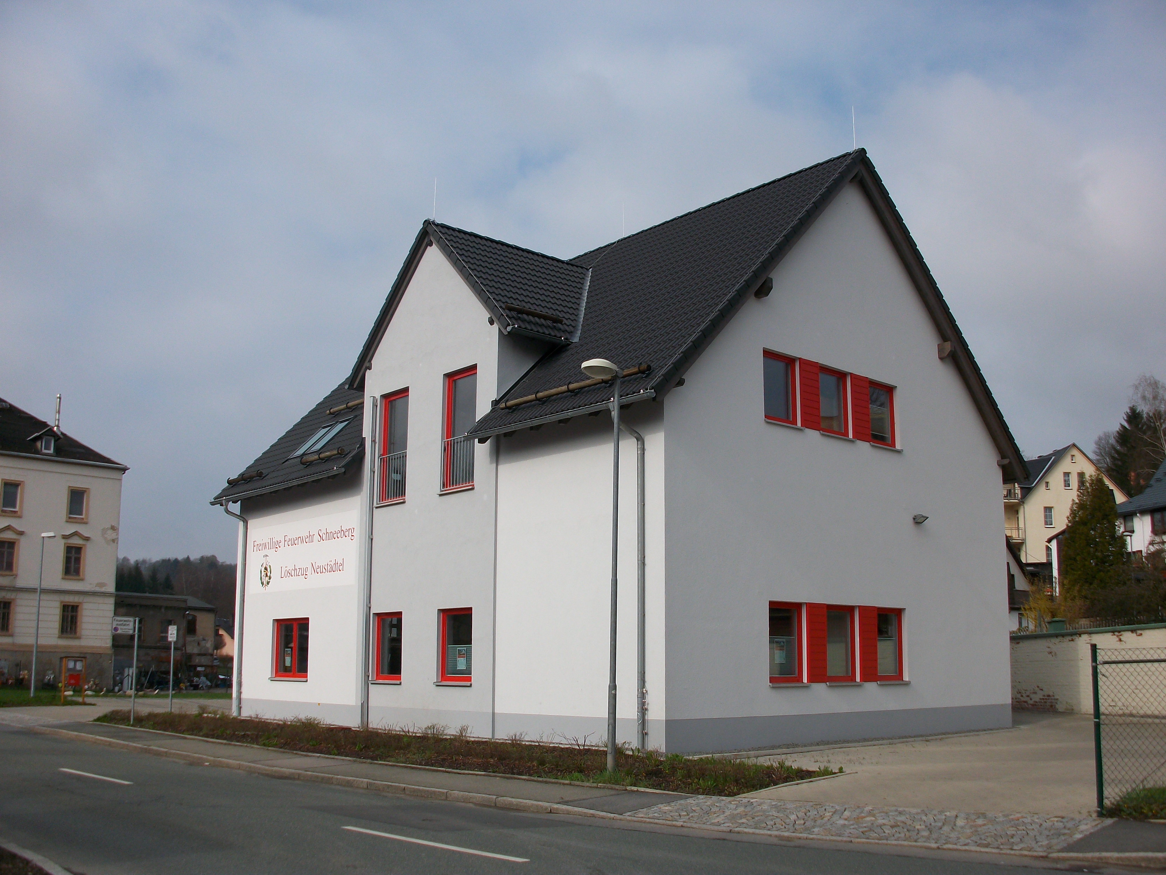 FFW Neustädtel